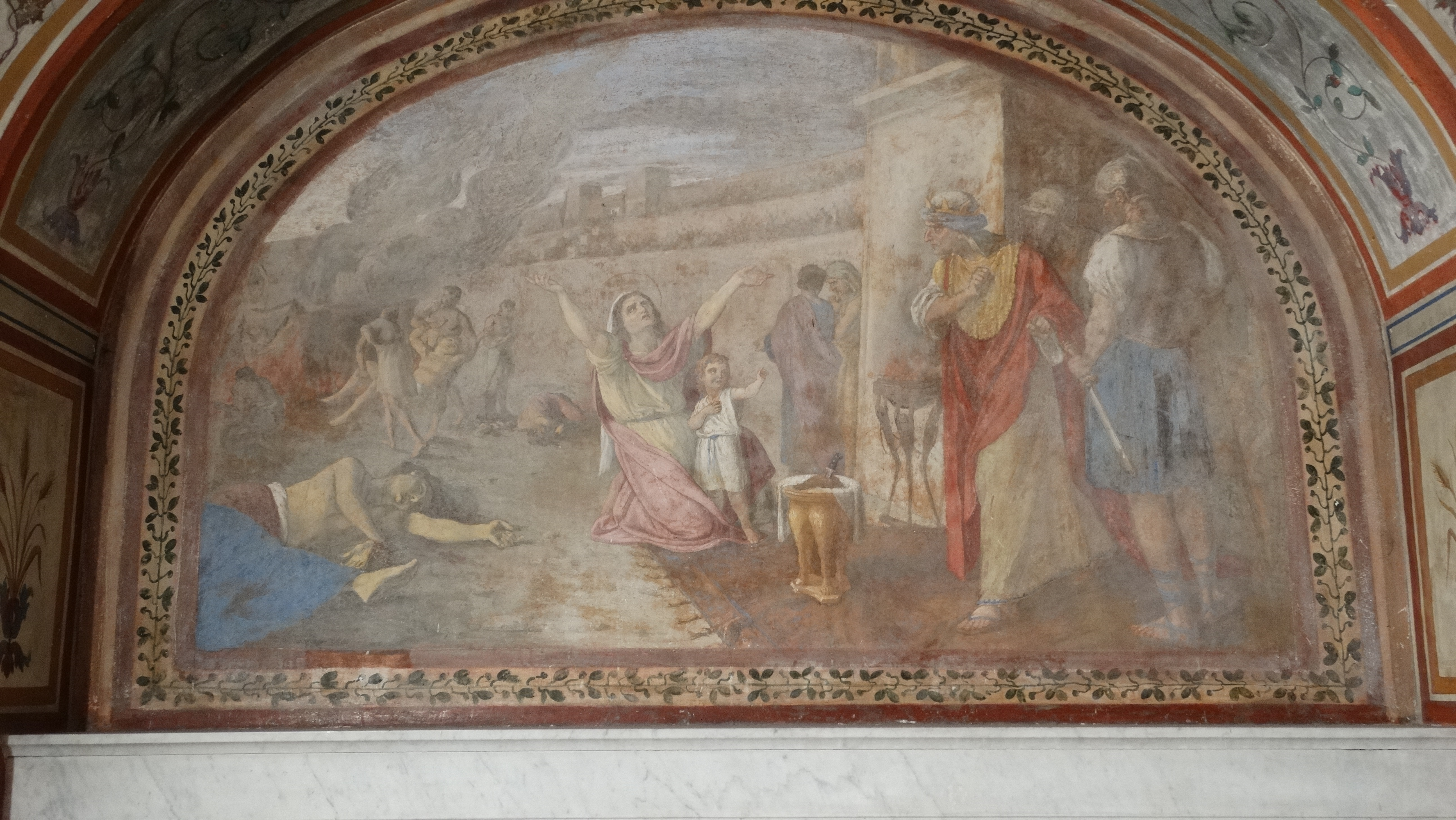 Martirio dei Maccabei di Silverio Capparoni 1876/77